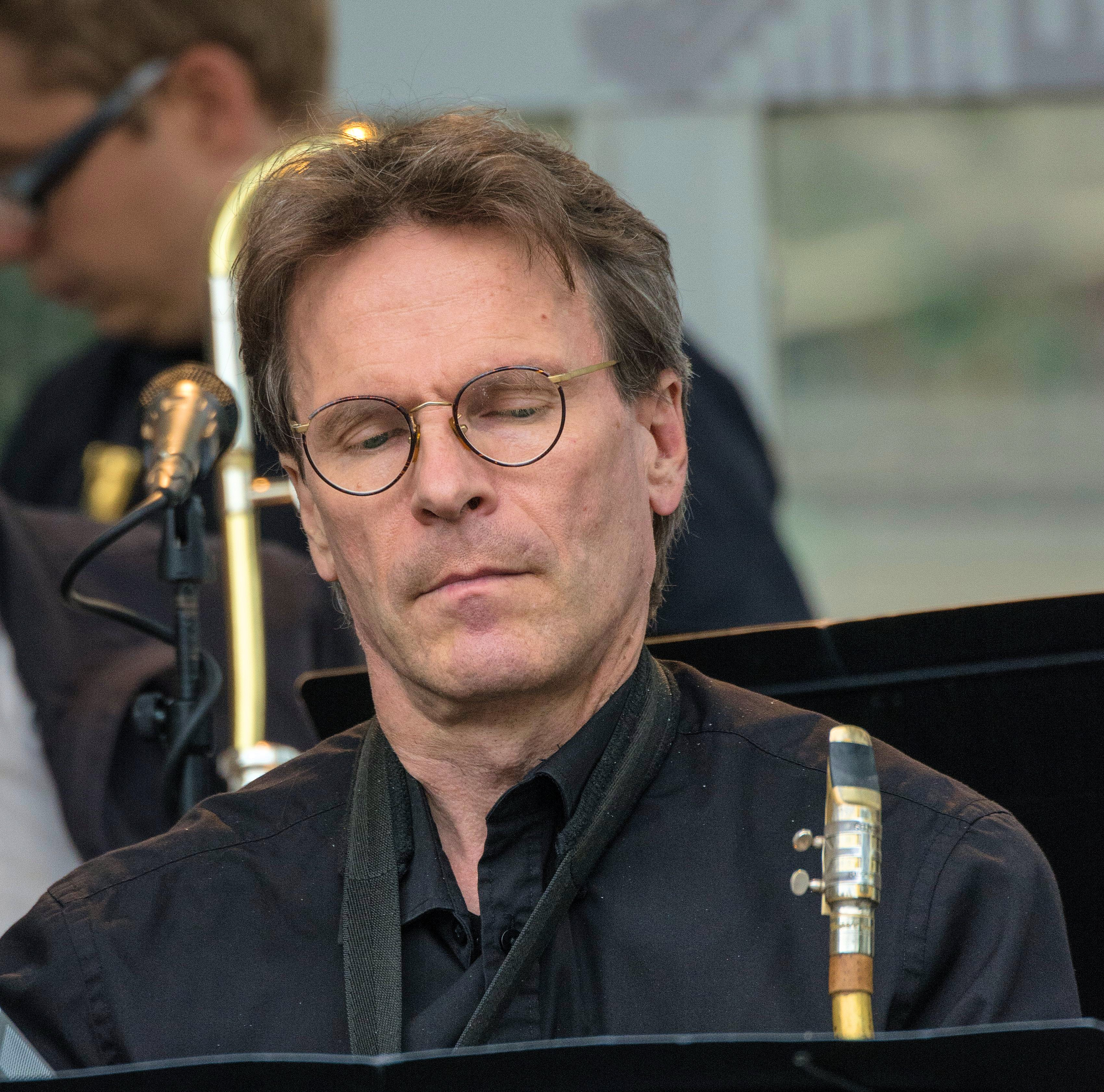 Teemu Salminen suomalainen saksofonisoittaja